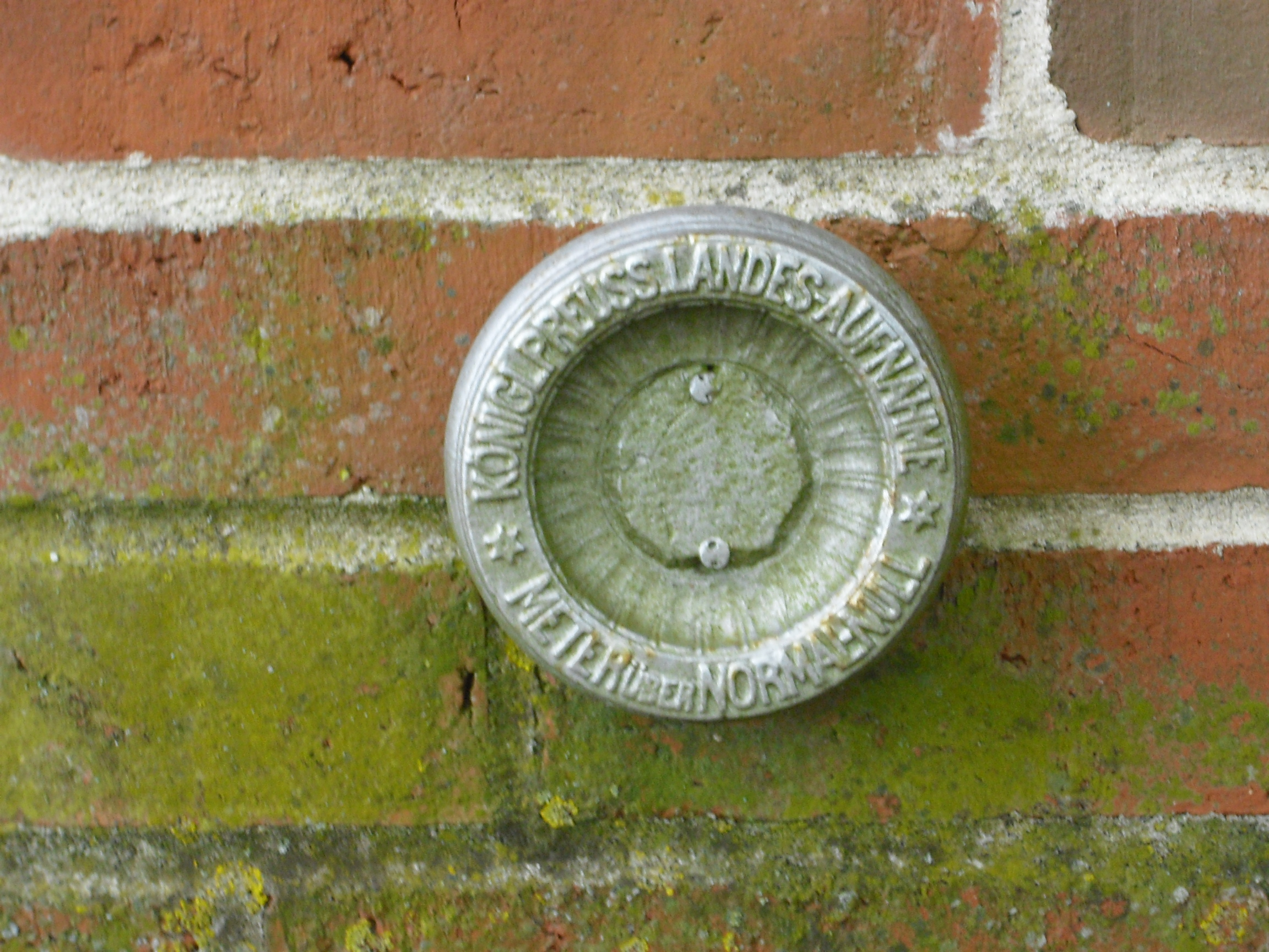 Evangelisch-lutherische Kirche in Middels (Stadtteil von Aurich, Landkreis Aurich, Niedersachsen, Deutschland): Katastermesspunkt